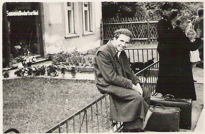 Martin Robbe, 1953